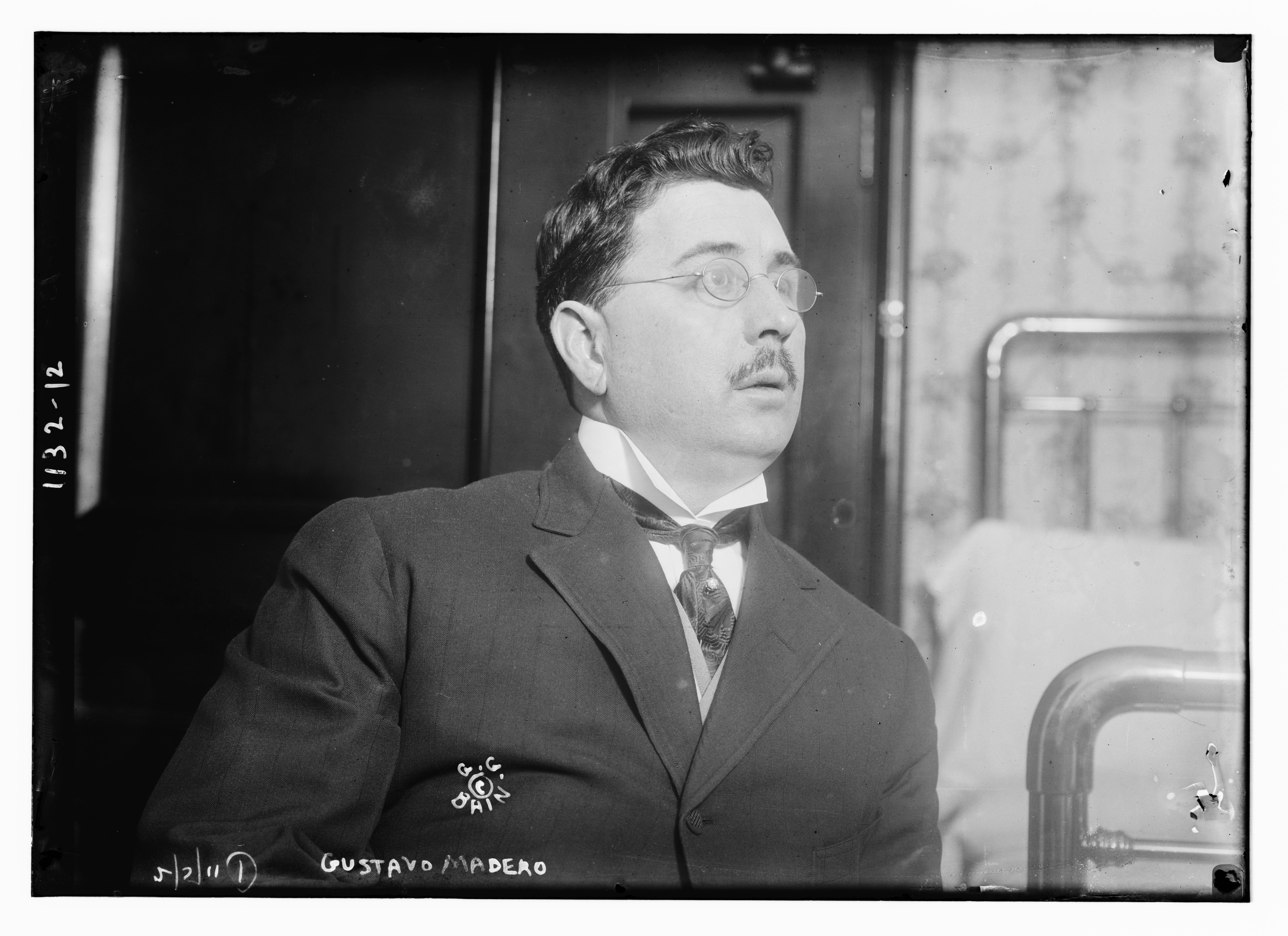 Gustavo Adolfo Madero on February 5, 1911